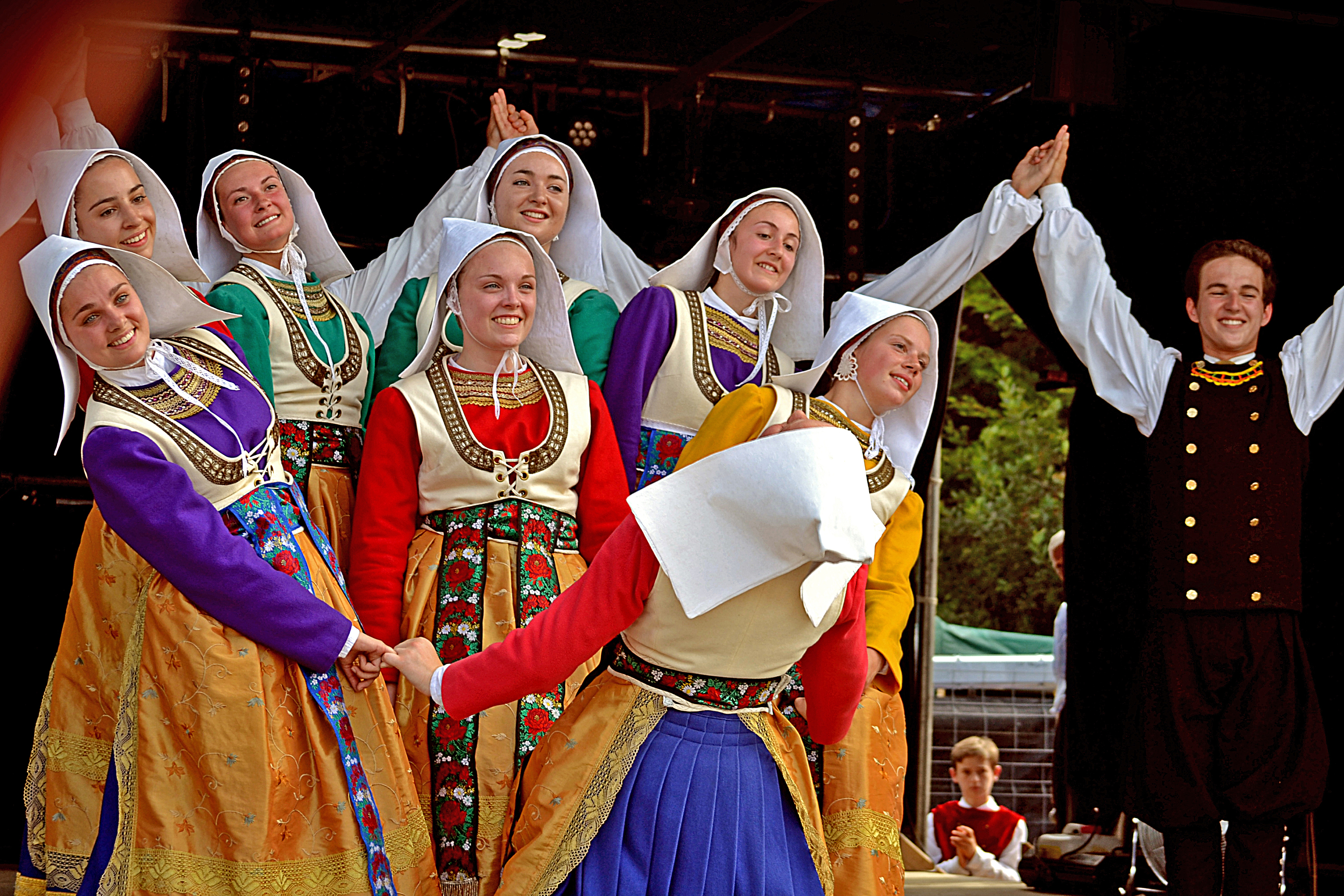 Bleuniadur au festival Gouel an Eost le 9 août 2015.